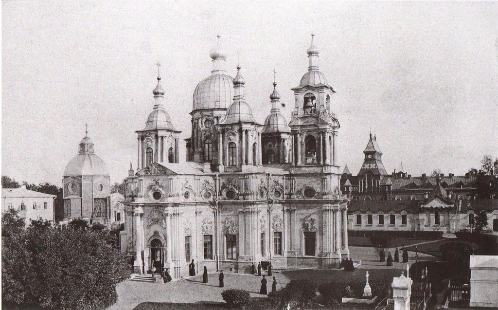 Троице-Сергиева Приморская пустынь. Собор Пресвятой Троицы. Общий вид с северной стороны.